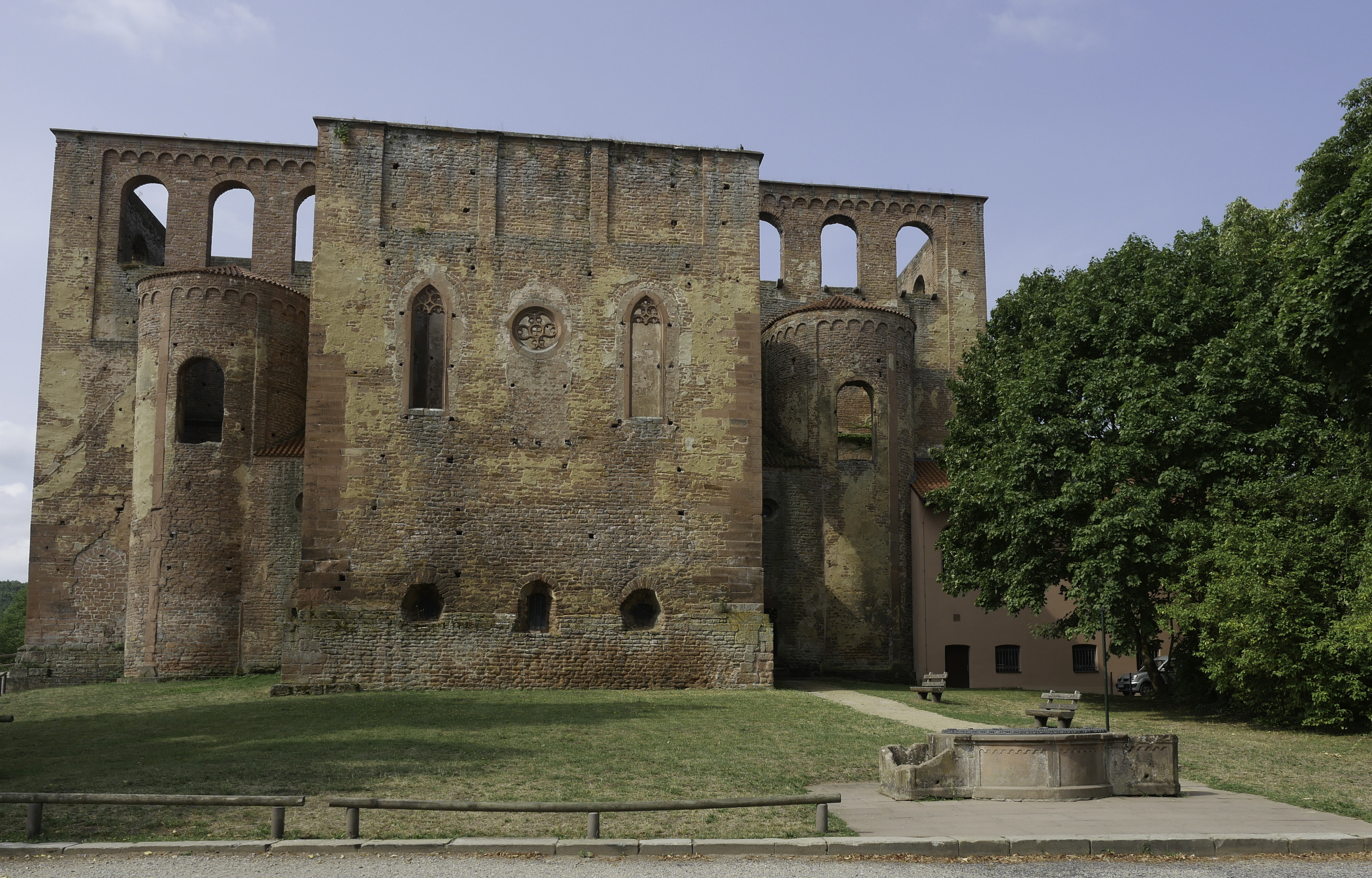 Ruine der Benediktinerabtei Limburg in Bad Dürkheim von Osten, mit Vorplatz